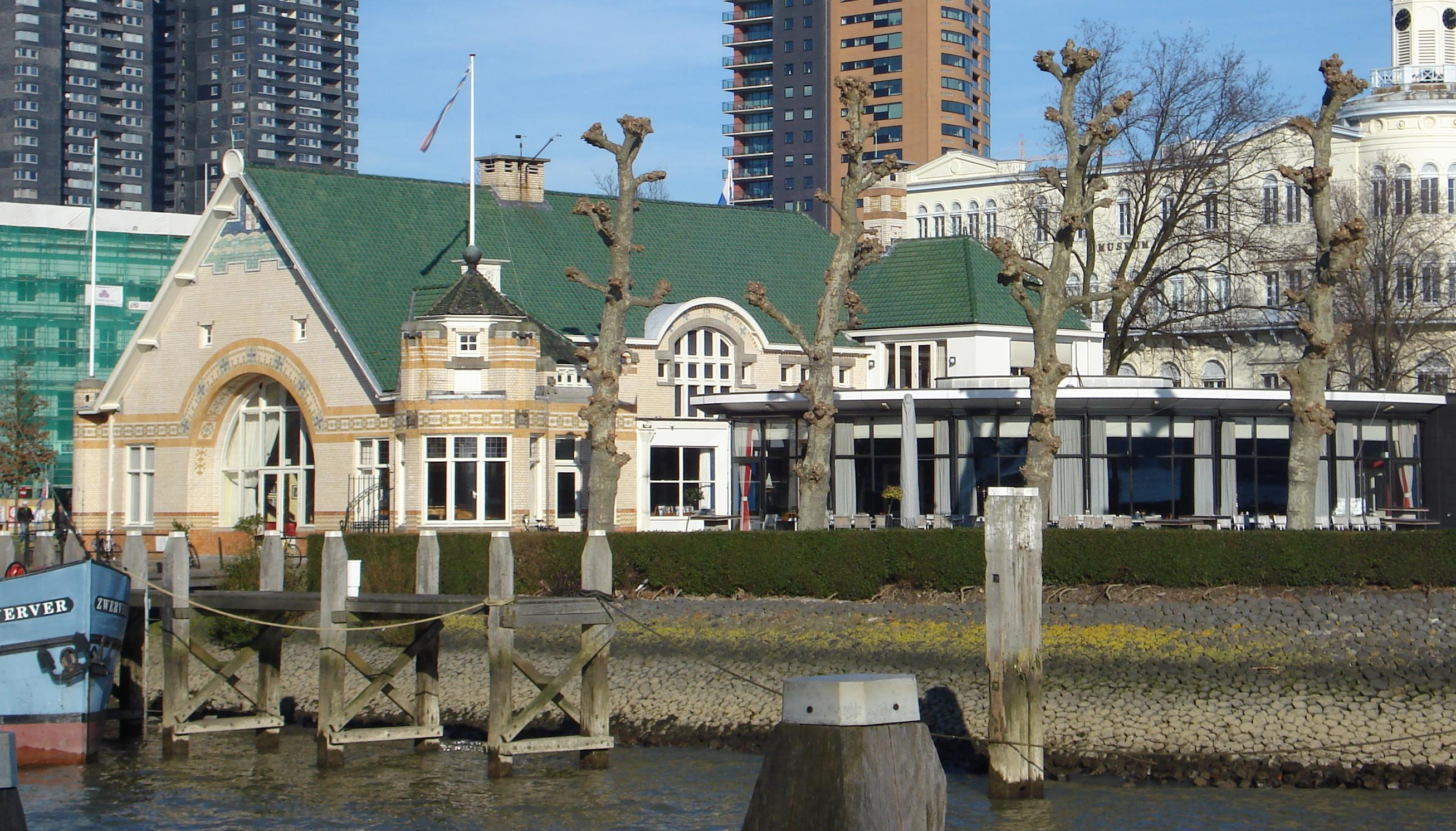 Rotterdam, Veerdam 1. Rijksmonument.